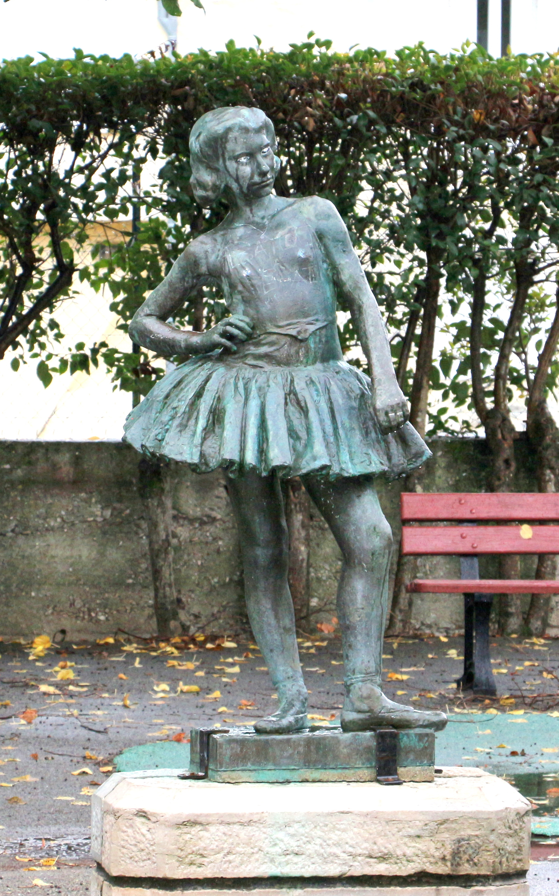 Danseuse. Bronze. Auteur: Enzo Dei. Jardin d'enfants, quartier du Temple Protestant. Saint Hippolyte Du Fort. Gard.